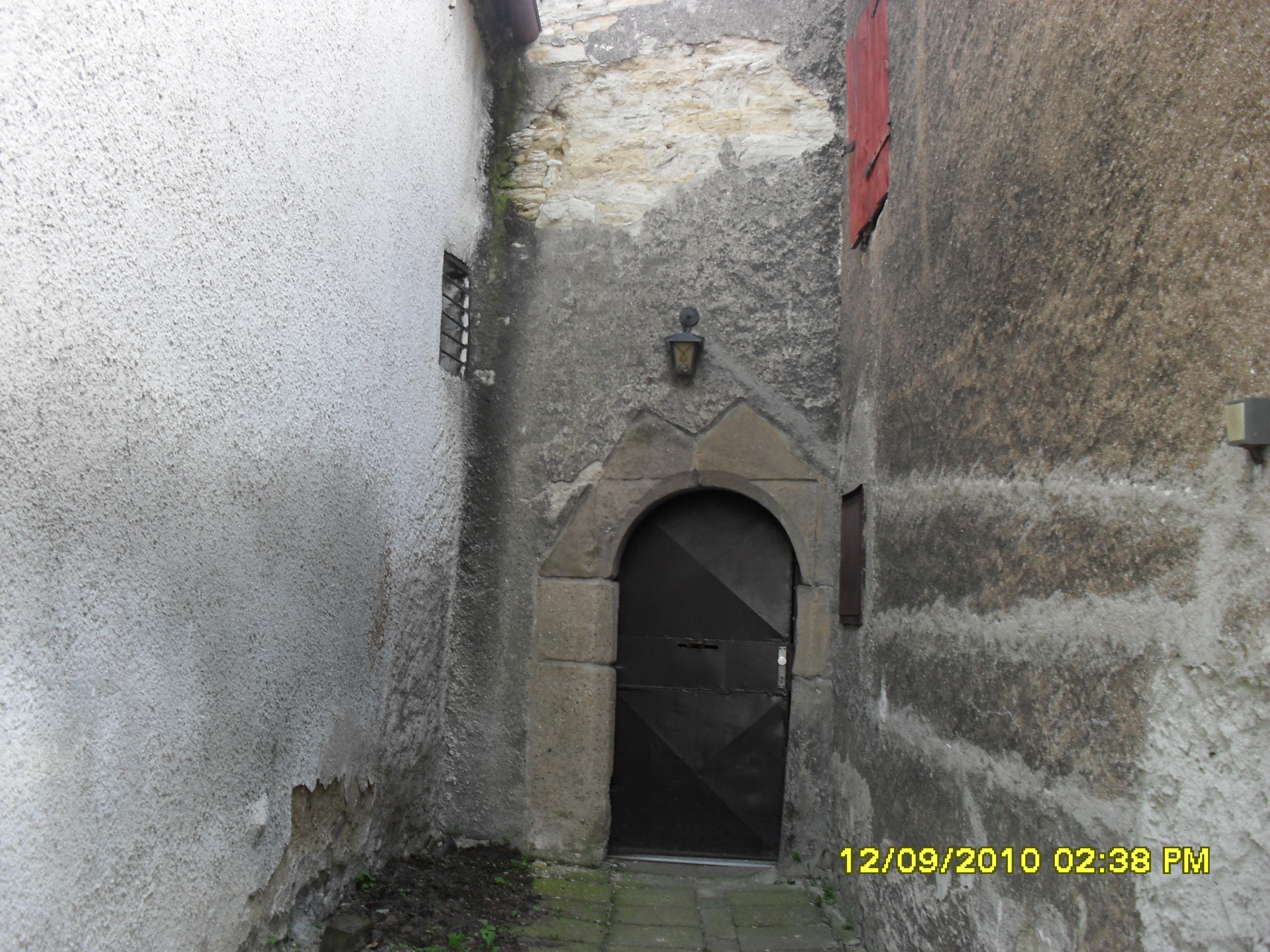 Zachovalá branka z původního hradu v zástavbě v Buštěhradu, mezi domy Starý hrad 14/11 a 13/13.